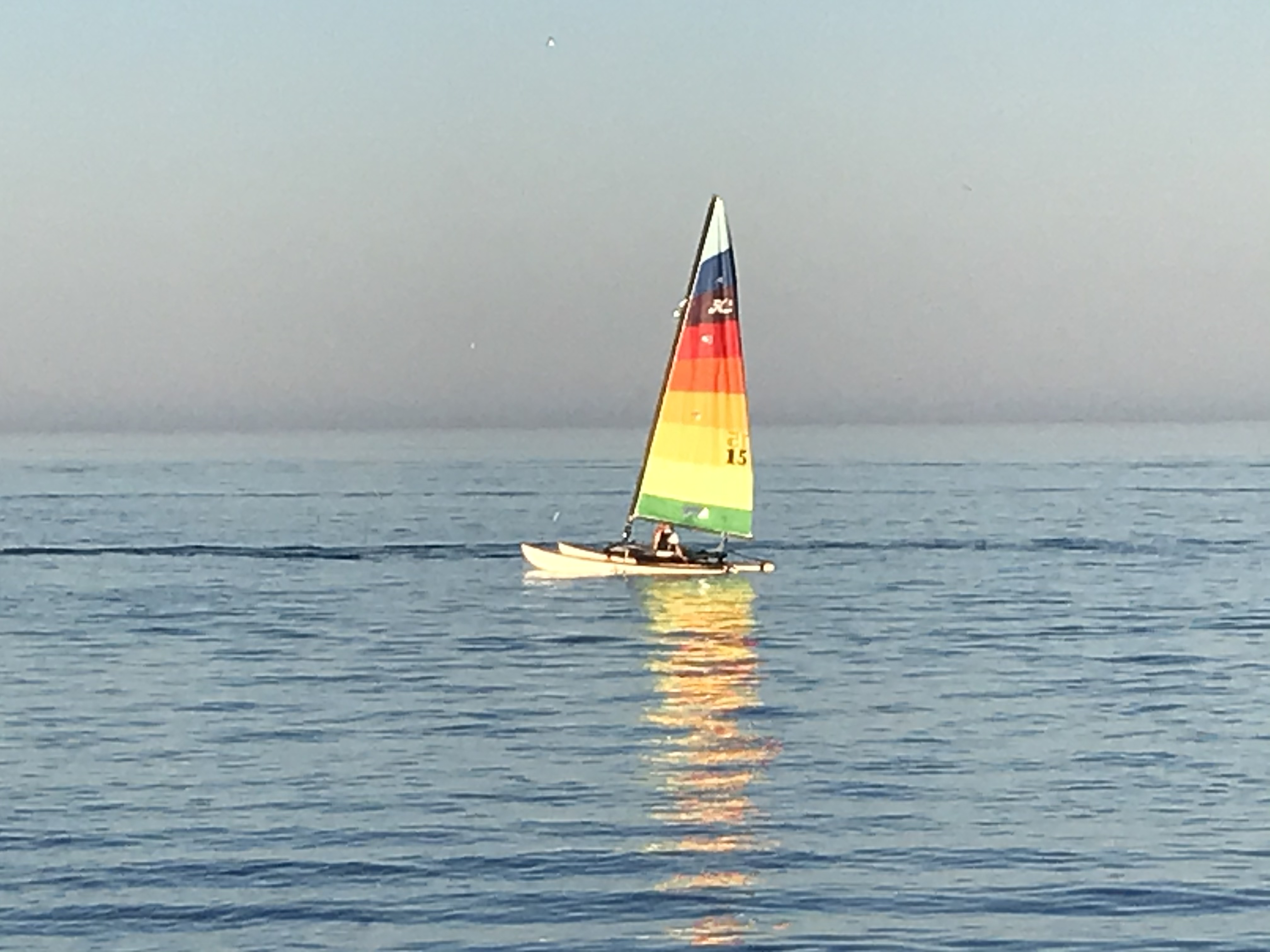 کوردی: بەلەمێک لە دەریاچەی ئەنتاریۆ